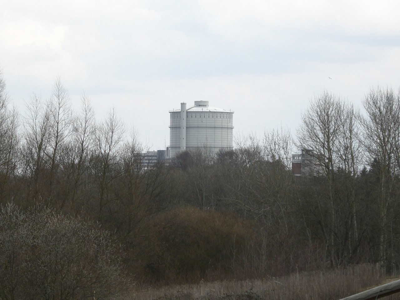 Gasometer (selbst fotografiert)